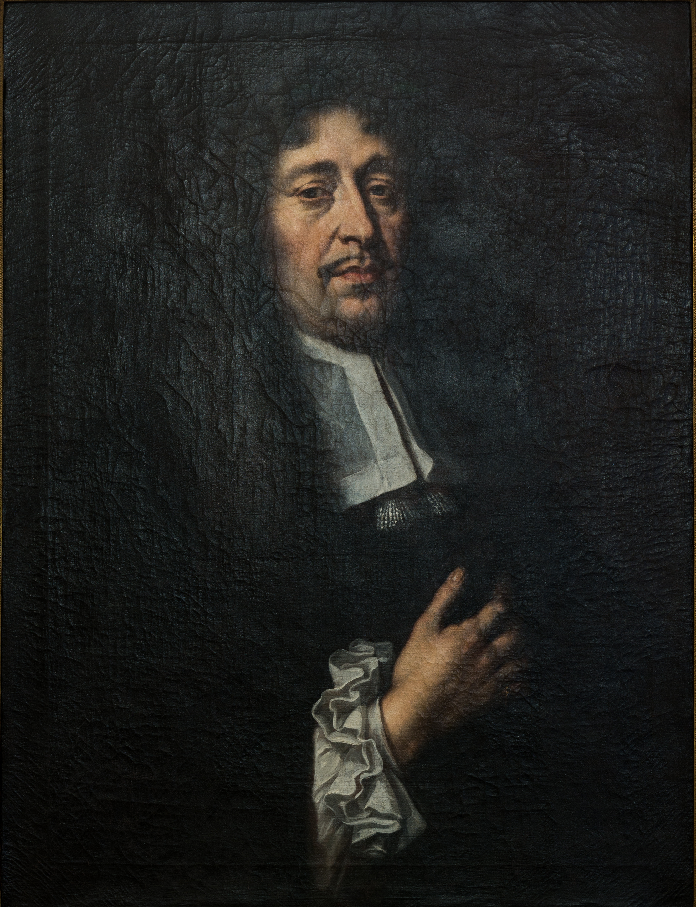 Jean Joachim Zentgrav (1643-1707), professeur de théologie protestante à l'Université de Strasbourg, doyen du Chapitre de Saint-Thomas. Portrait à l'huile sur toile, anonyme, identifié par la famille à l'aide d'un portrait gravé contemporain. Collections du Chapitre de Saint-Thomas à Strasbourg, salle Koch